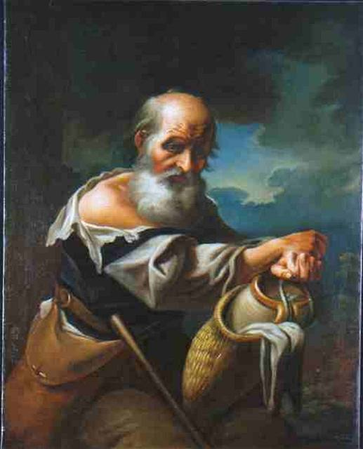 Žebrák